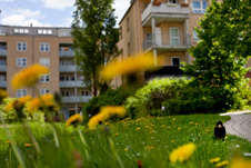 Urbanplanen